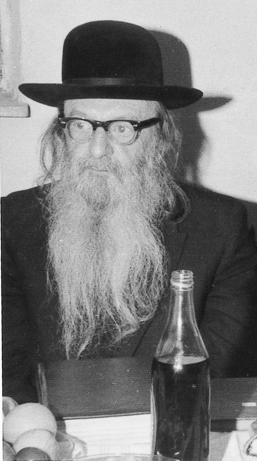 בשמחה משפחתית